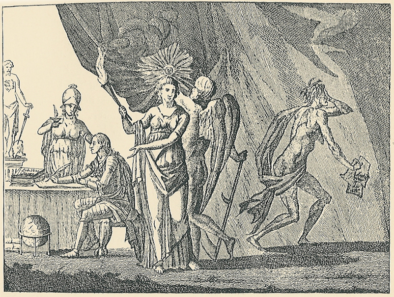 "Frederick arbeider". Satirisk stik fra 1790. Kronprins Frederik arbejder på landboreformerne. Visdomsgudinden Minerva står med et lys ved hans side. Bag ham står gudinden Alethia som holder sandhedens fakkel. I baggrunden tidens vingede gud der drager fremtidens slør til side. Til højre misundelsens gustne furie Avind, med en samling satiriske skrifter i hånden.